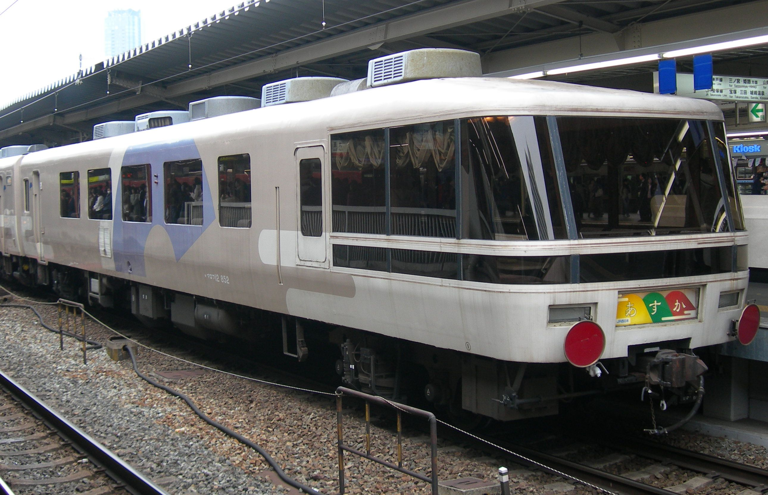 ジョイフルトレイン「あすか」マロフ12 852